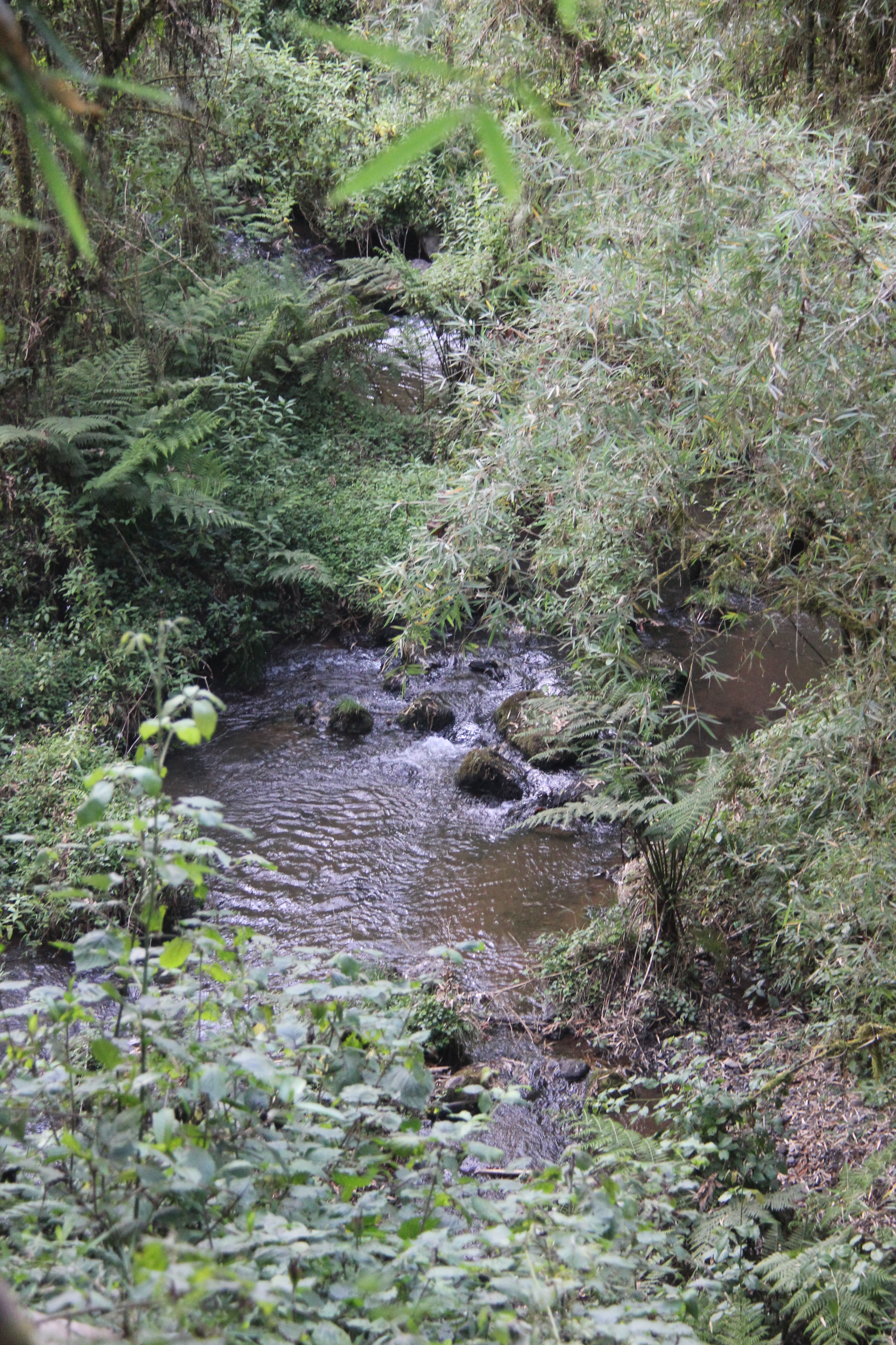 Harenna Forest